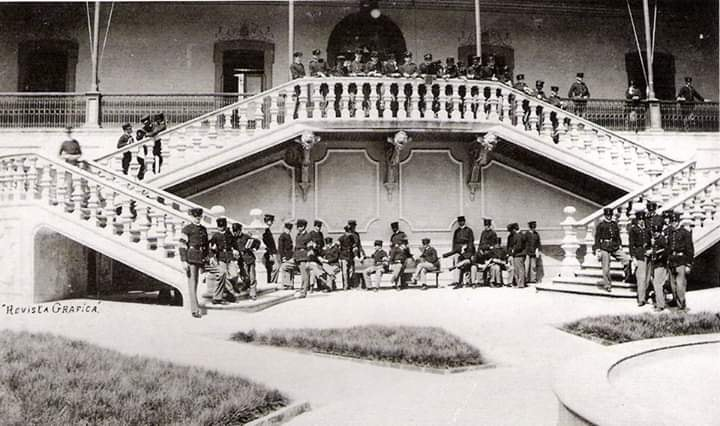 Escalinatas del Colegio Preparatorio de Xalapa con personas.